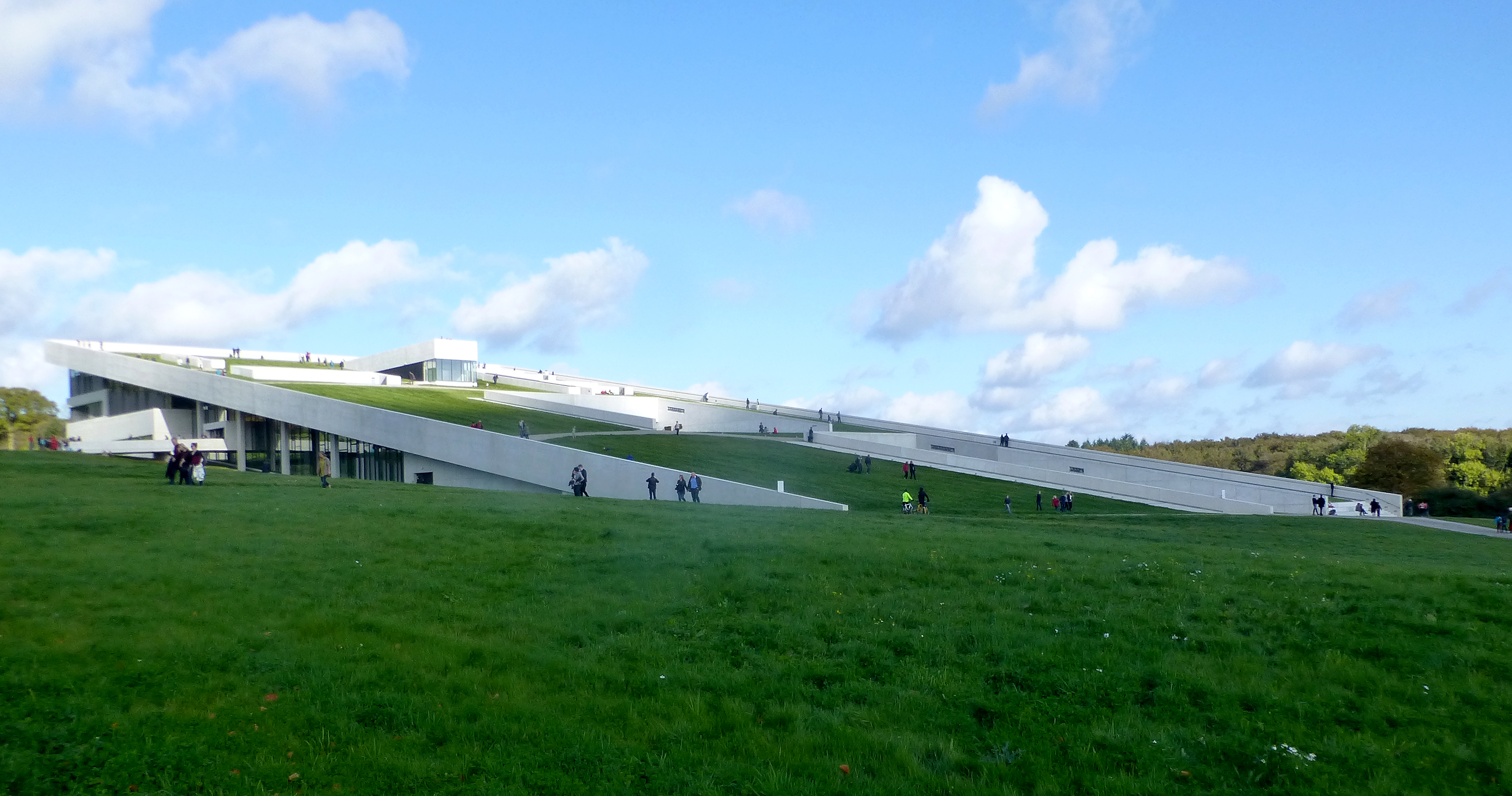 Det ny Museum set fra sydvest